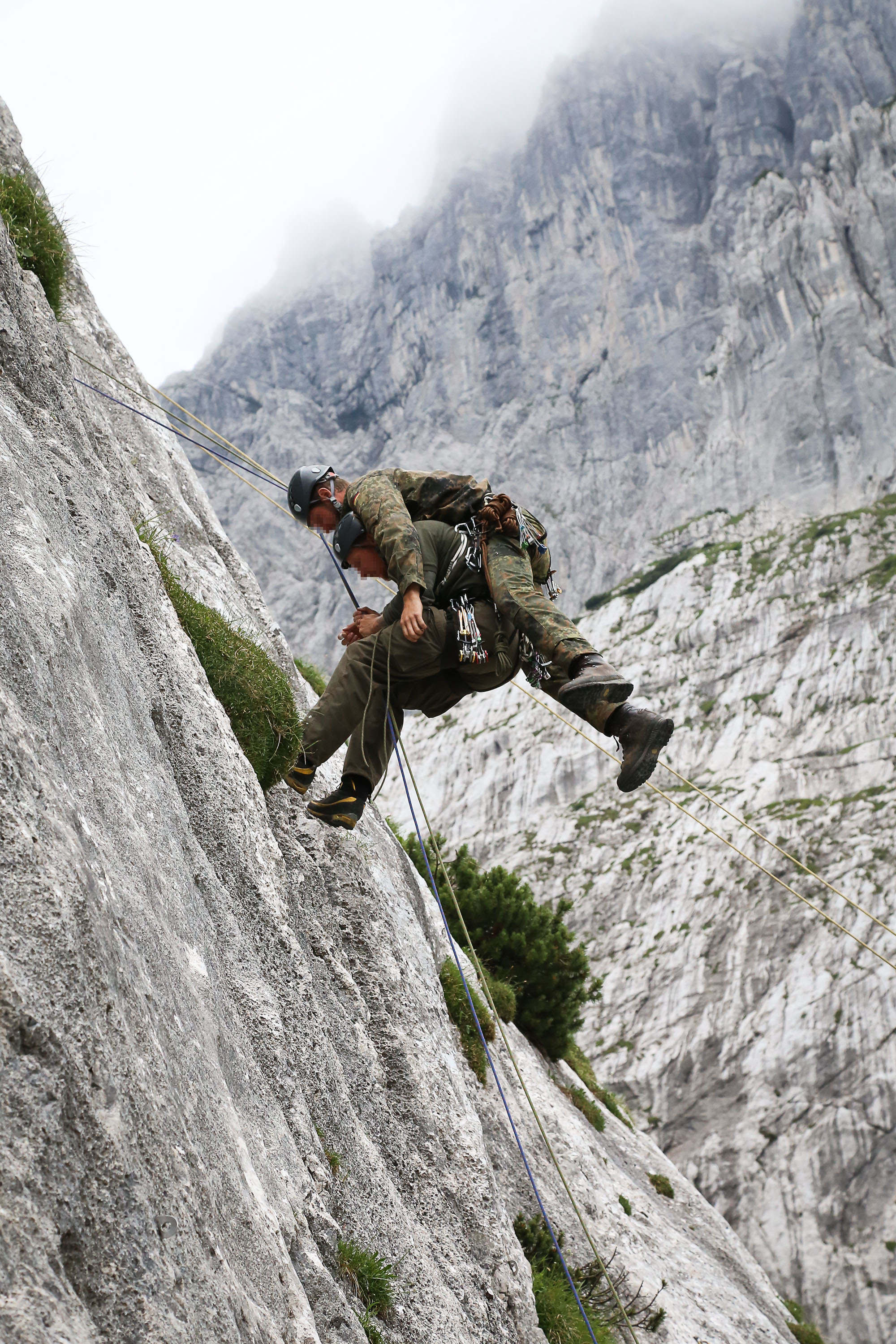 Das Bergen eines Kameraden wird geübt.